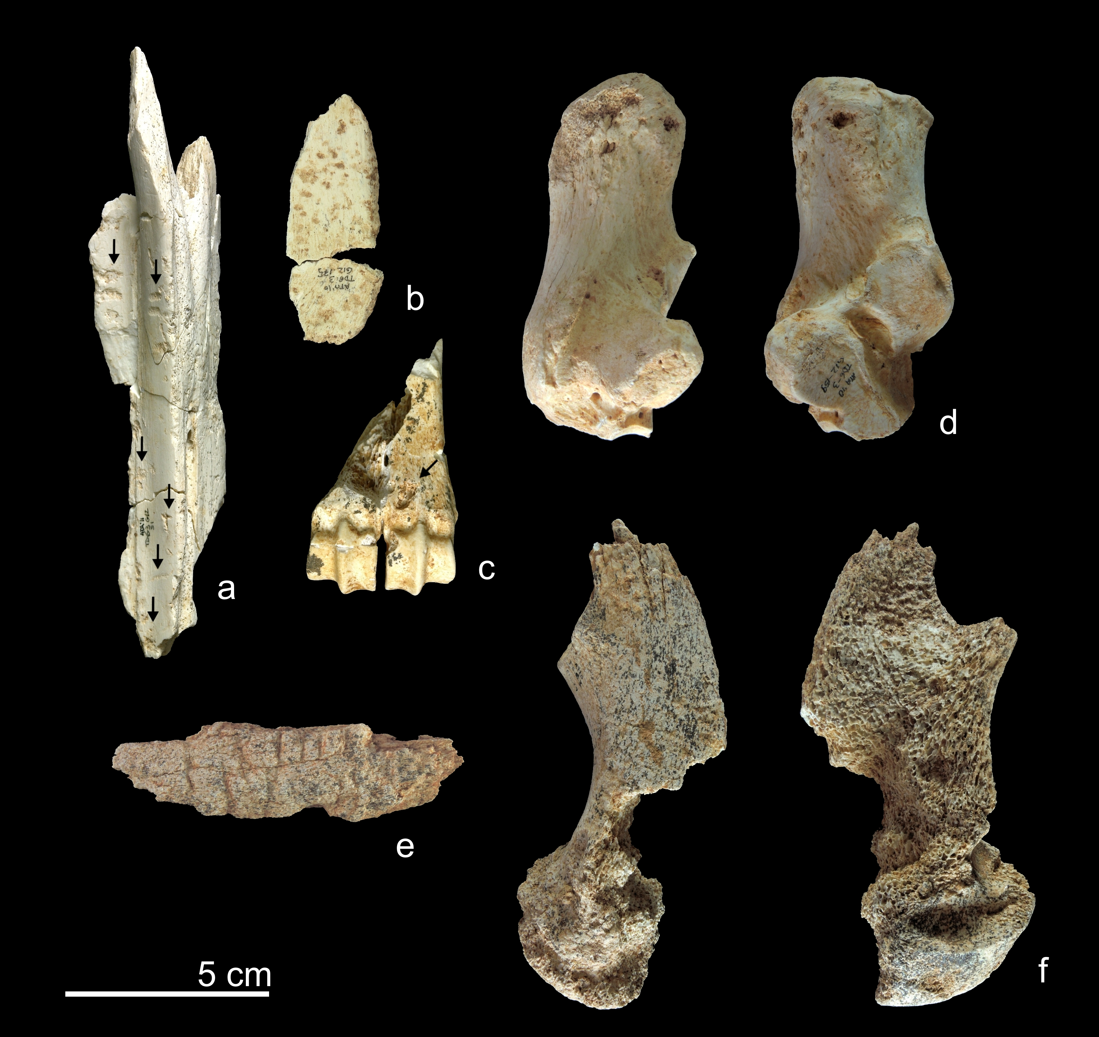 Ossos modificats per carnívors de TD6.3